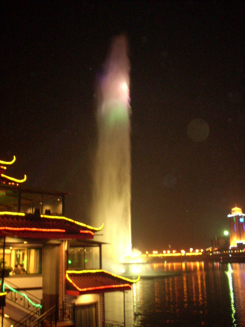 河源市新丰江音乐喷泉.